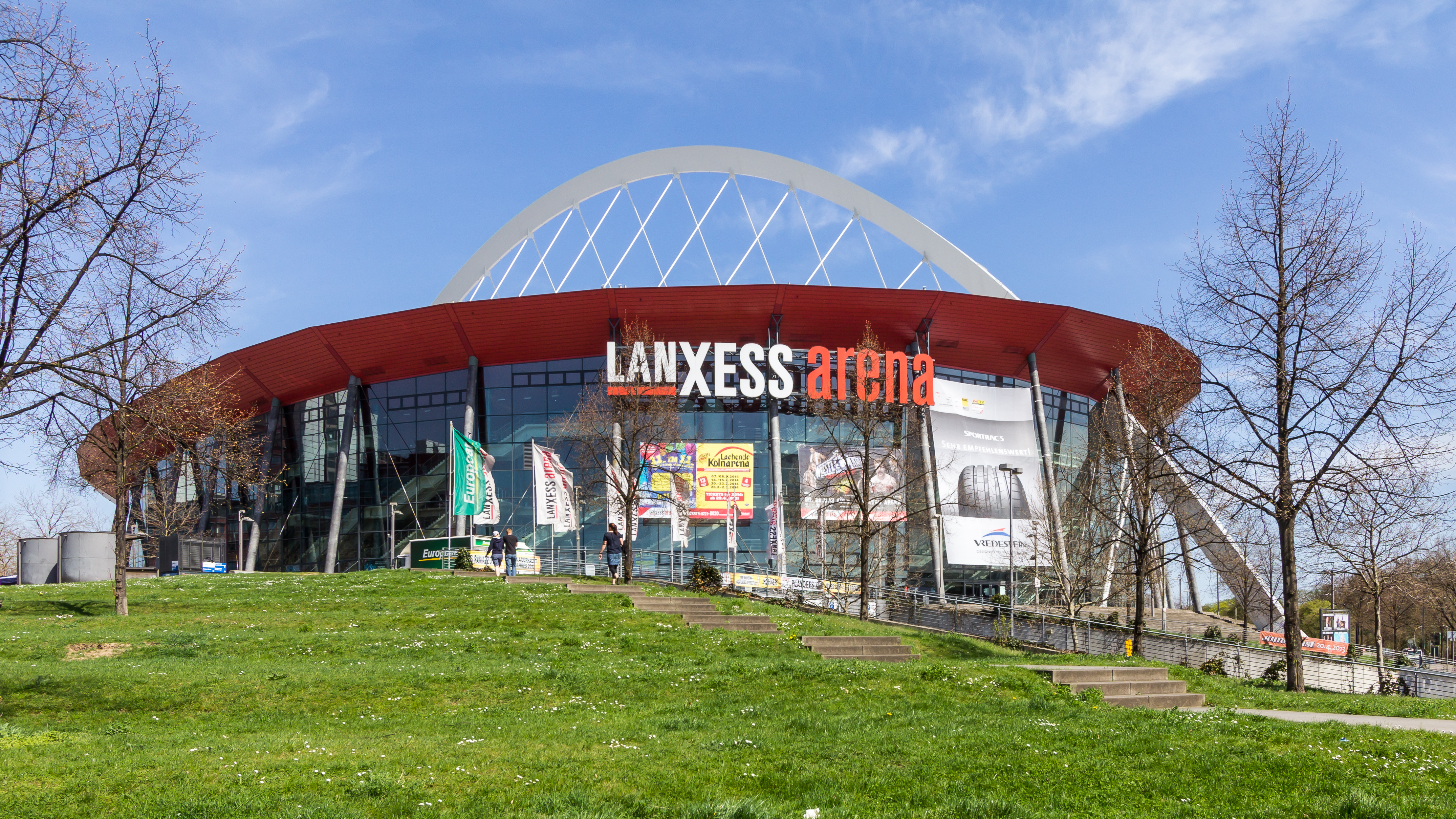 Lanxess-Arena (ehemals Kölnarena, im Volksmund auch Henkelmännchen genannt) mit Fahnen. Architekt: Peter Böhm. Bauzeit: 1996-1998